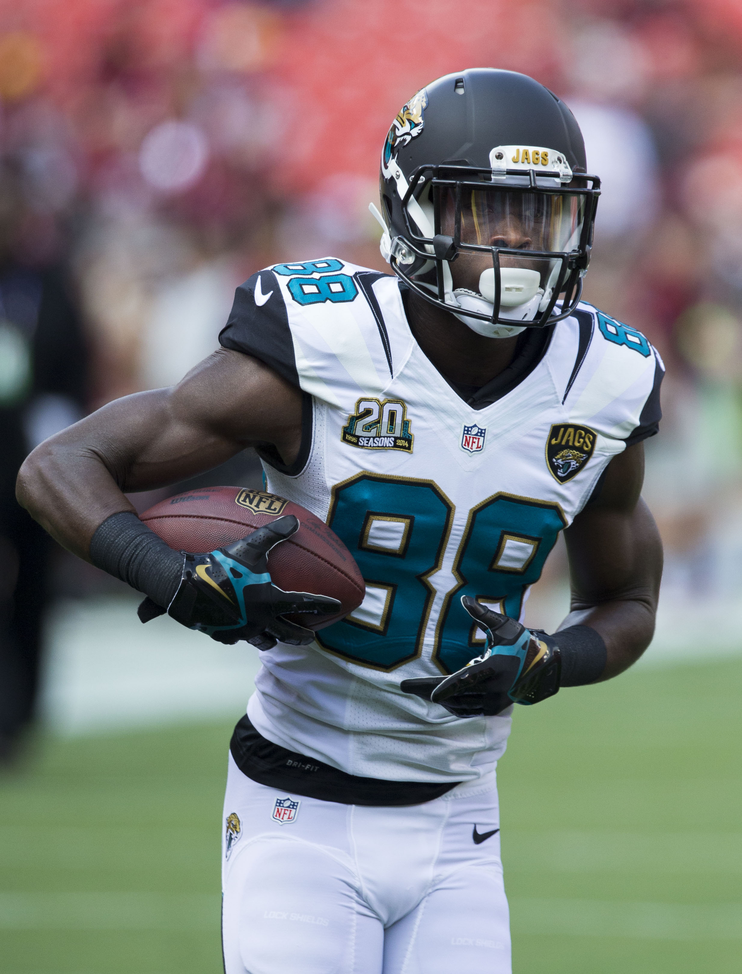 Jaguars at Redskins 9/14/14